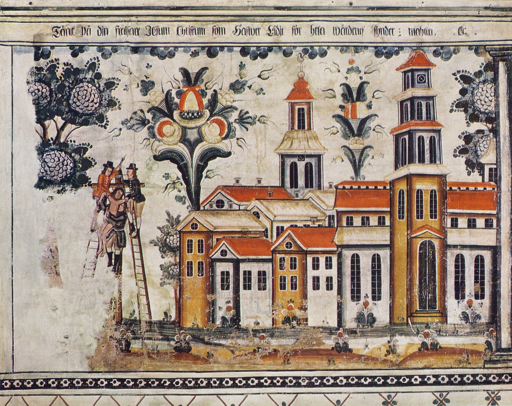 Dalamåleri i Danielsgården, Bingsjö, Dalarna